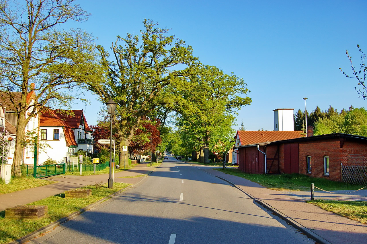 Die Eichenallee in Gelbensande